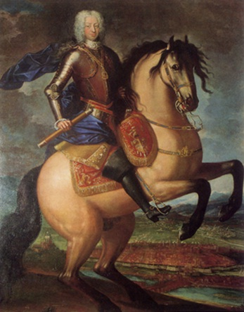 Equestrian portrait of Charles Emmanuel III of Sardinia (1701-1773)label QS:Len,"Equestrian portrait of Charles Emmanuel III of Sardinia (1701-1773)" label QS:Lhu,"III. Károly Emánuel szárd–piemonti király portréja, Torinó, 1701. április 27. - Torinó, 1773. február 20.. 1730-1773 között Szárd-piemonti király, Savoya hercege, Piemont hercege. Szülei: II. Viktor Amadé szárd–piemonti király (1666-1732) és Anna Mária orléans-i hercegnő (1669-1728)."